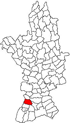 Categorie:Hărţi ale judeţului Olt